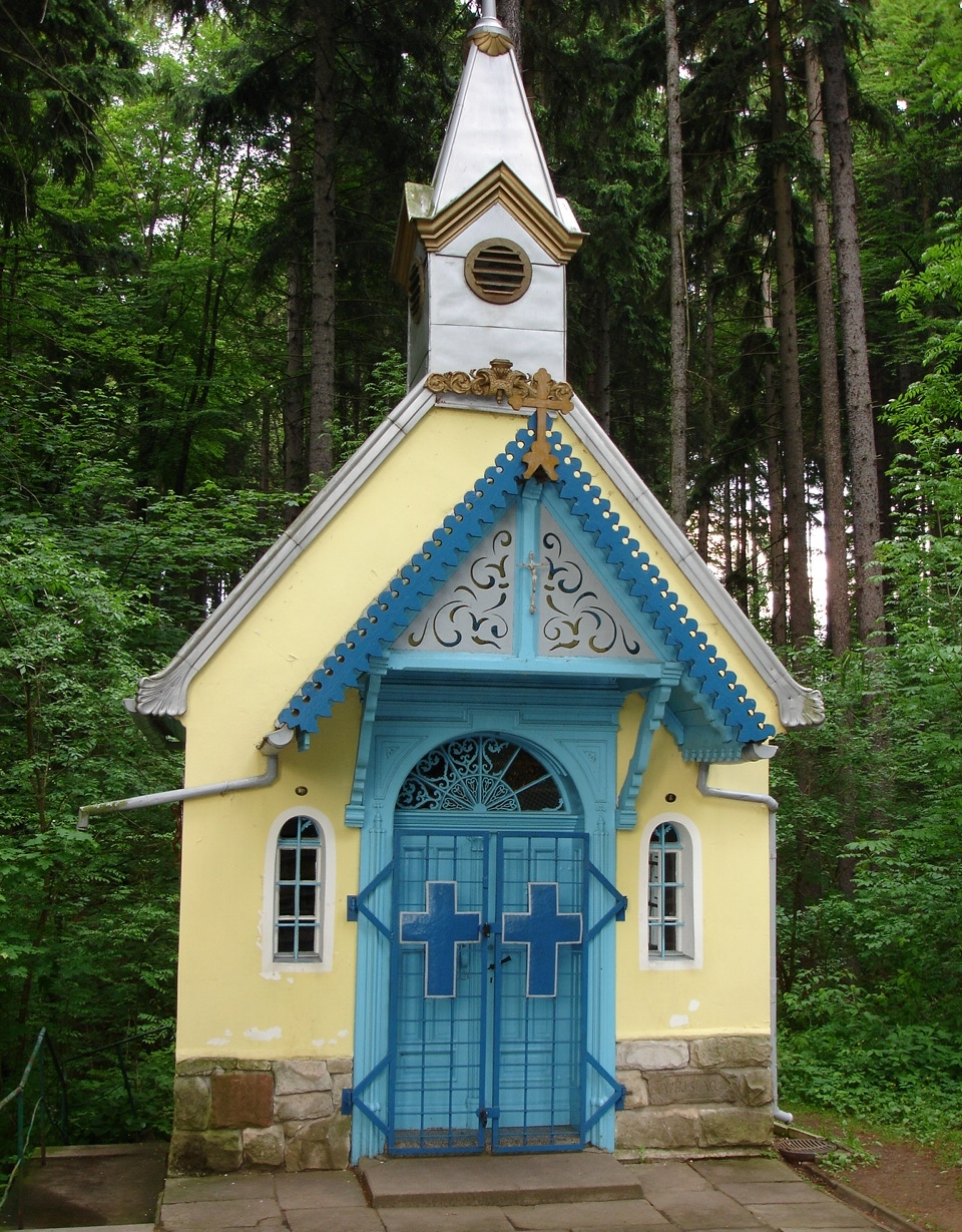 Wallfahrtskapelle bei Slone (Schlaney)